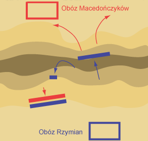 Bitwa pod Kynoskefalaj (197 pne)- 3 faza